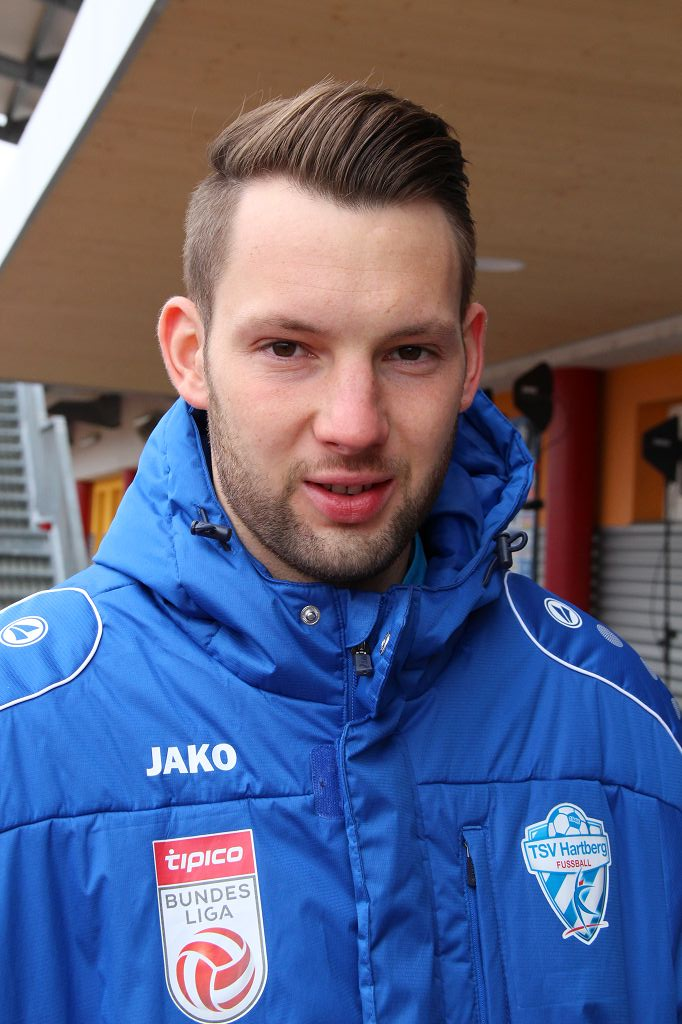 Thomas Rotter (Hartberg)